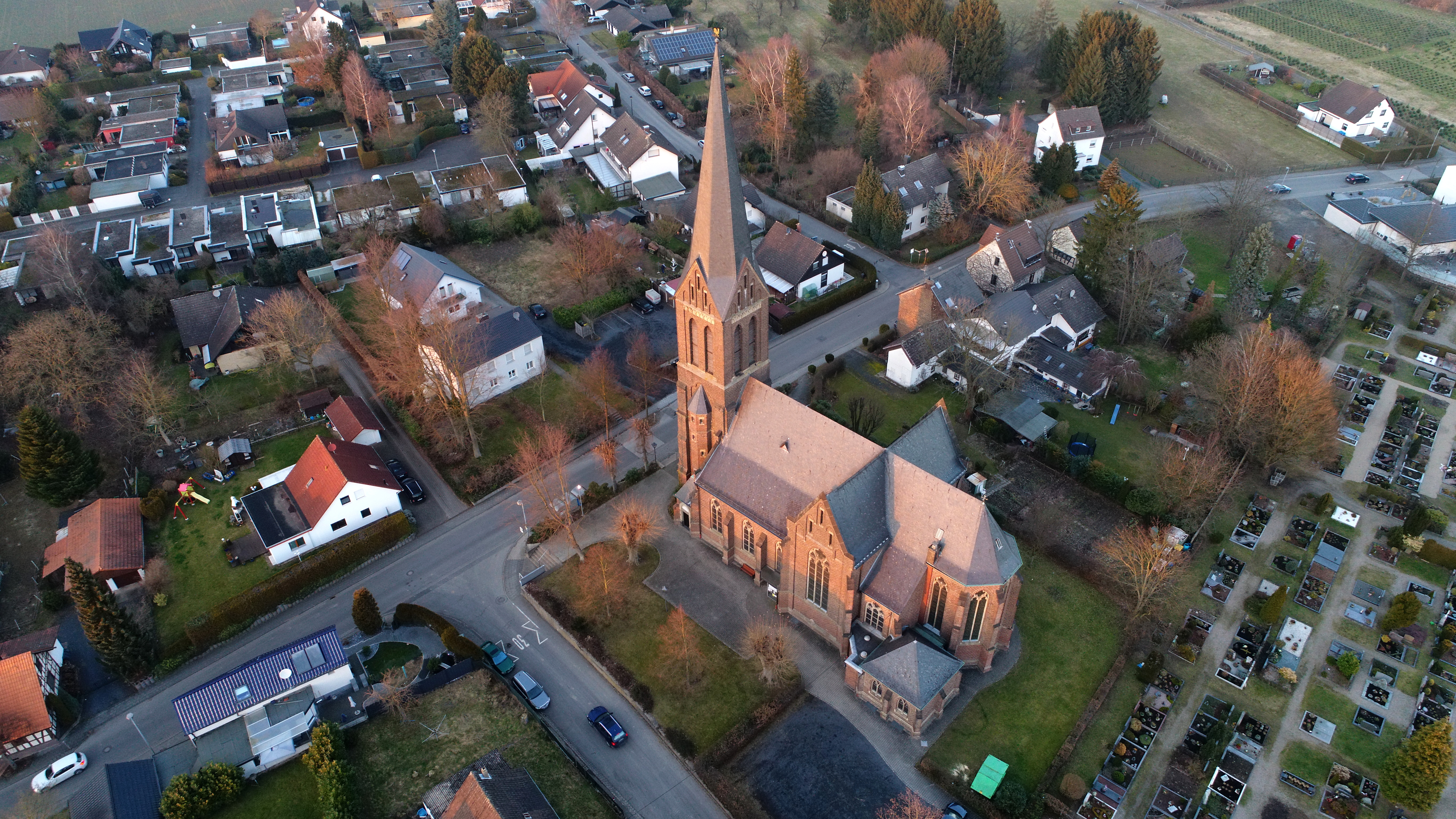 Hennef Rott, Luftaufnahme (2017)